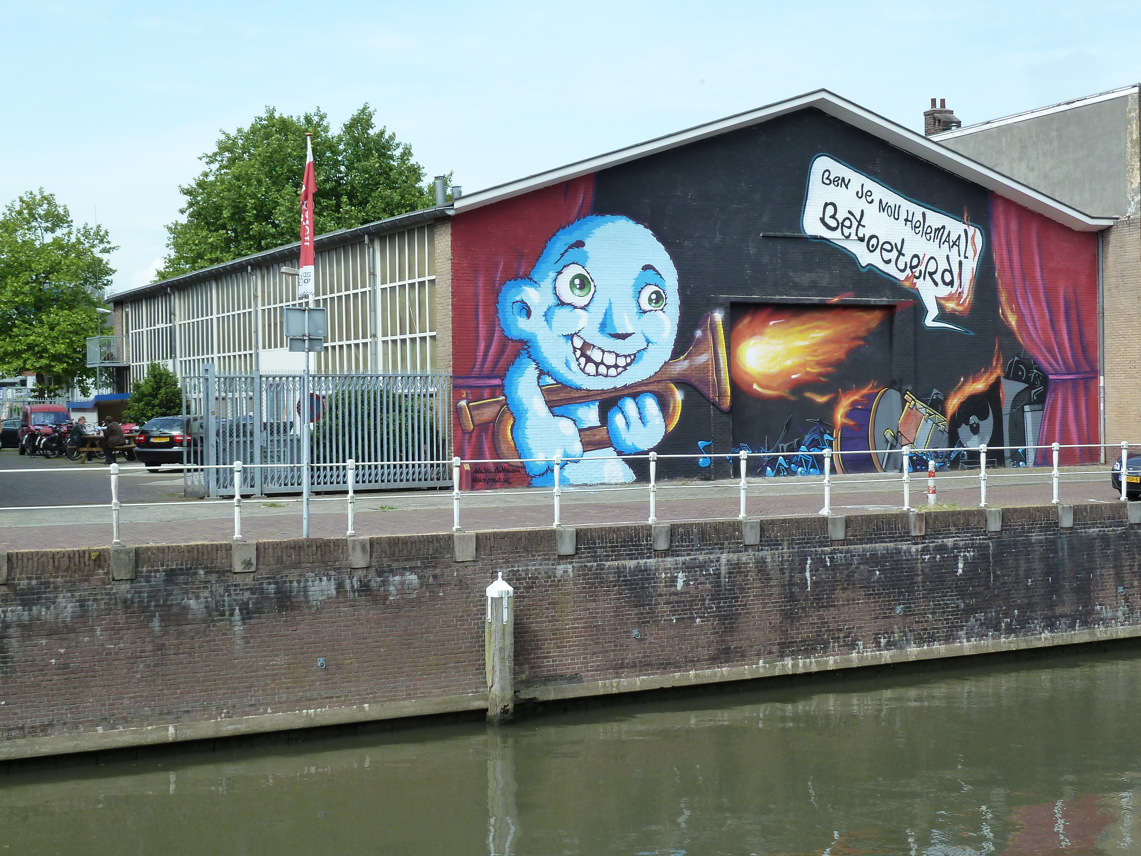 Kytopia, studio van Kyteman langs de Vecht in het ontwikkelingsgebied Zijdebalen.